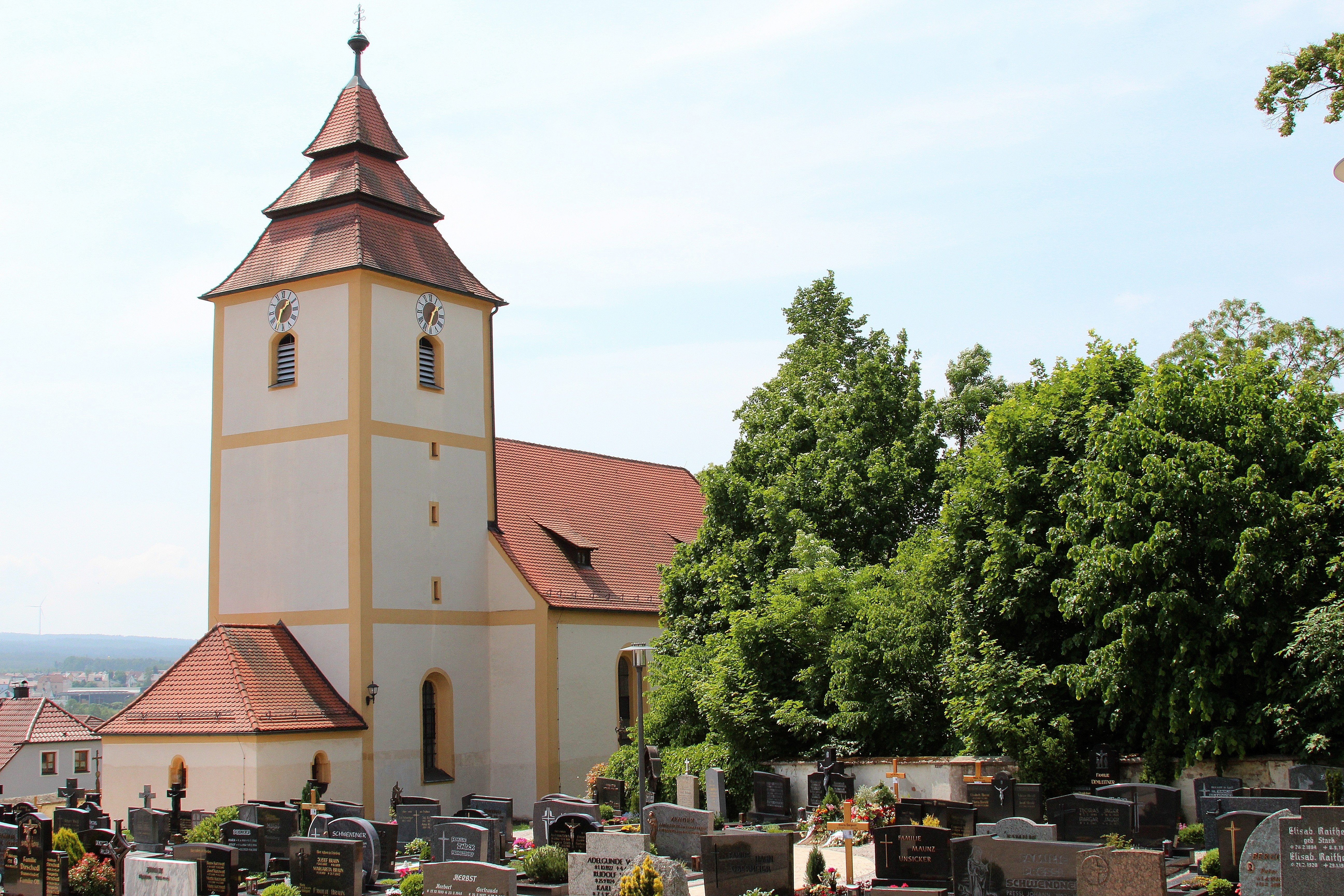 St. Emmeram, Oberköblitz; Markt Wernberg-Köblitz, Landkreis Schwandorf, Oberpfalz, Bayern